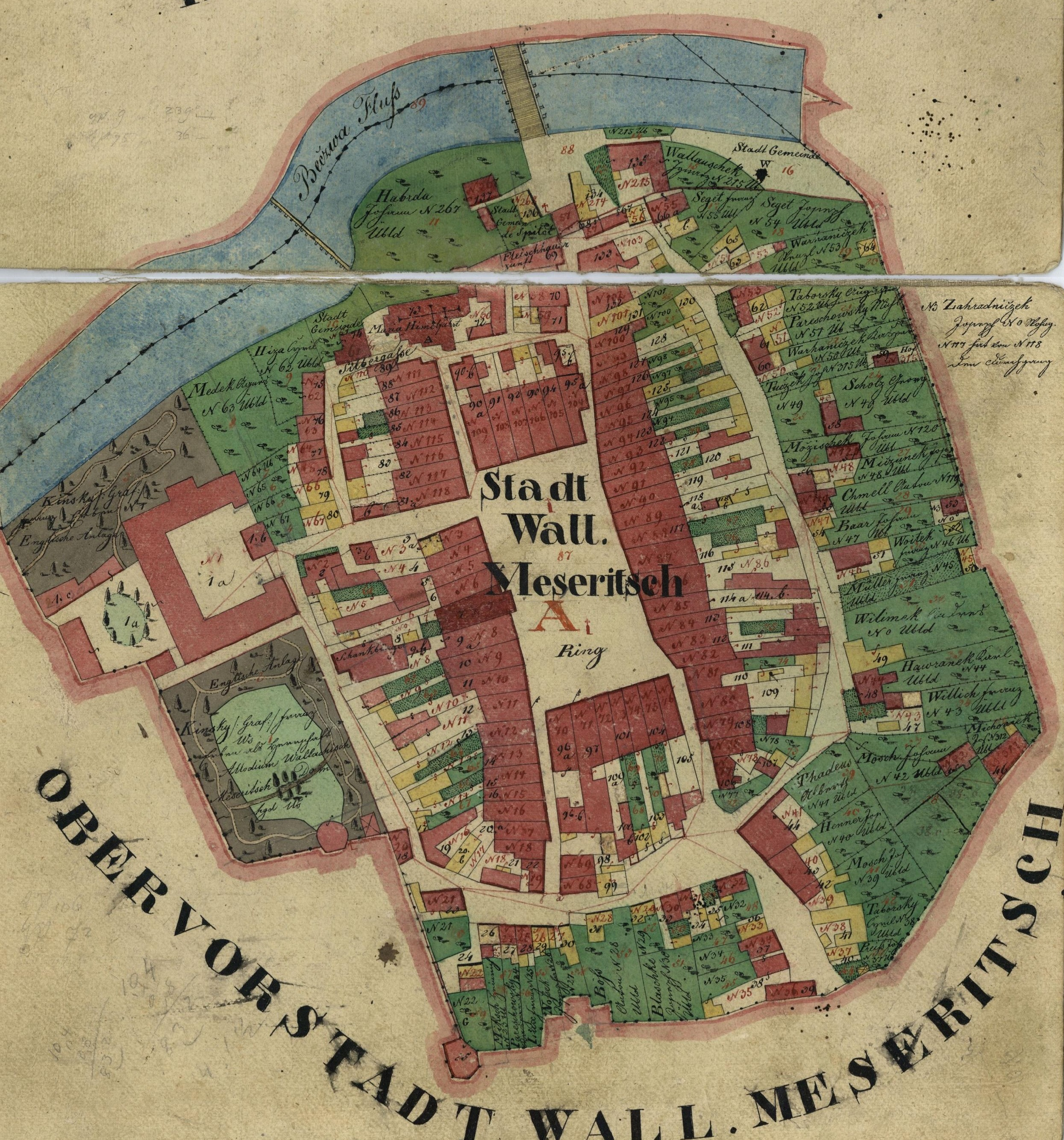 Indikationsskizze: Wall. Meseritsch